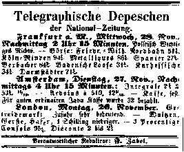 Die erste Telegraphen-Depesche der „National-Zeitung” (1849)